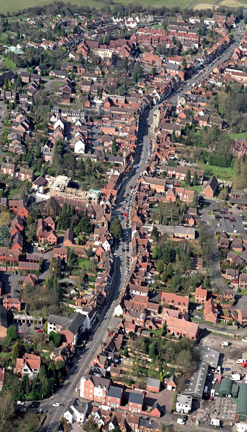 Henley - aerial view